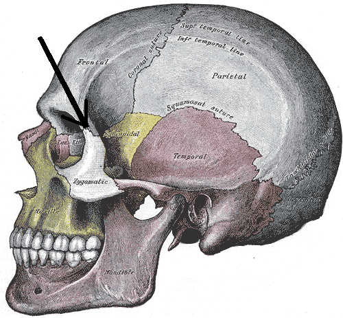 módosítva